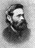 Károli János Hungarian zoologist